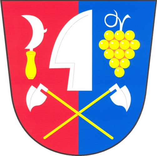 znak, Jezeřany Maršovice, okres Znojmo